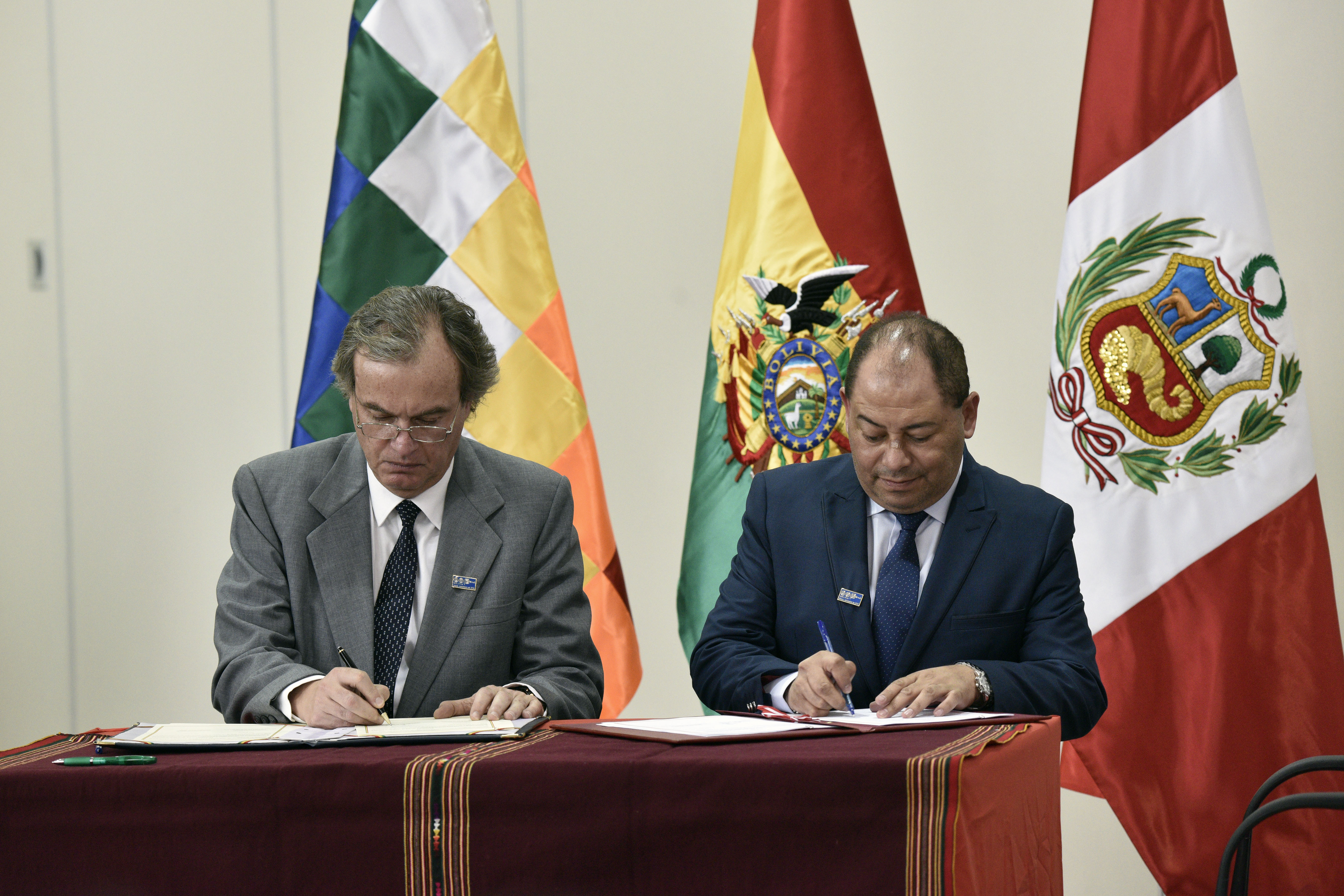 Firma Declaración Conjunta del Encuentro Presidencial y II Gabinete Binacional Perú – Bolivia, Sucre - Bolivia